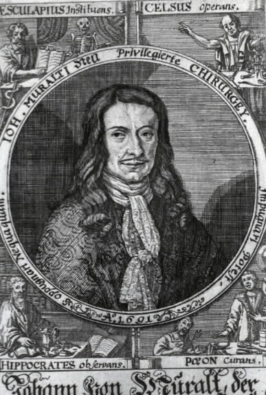 Johannes von Muralt (* 18. Februar 1645 in Zürich; † 12. Januar 1733 in Zürich), schweizerischer Anatom und Chirurg